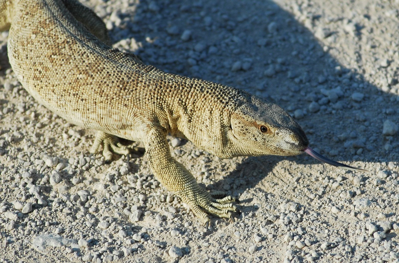 Namibie, Namibia, Etosha